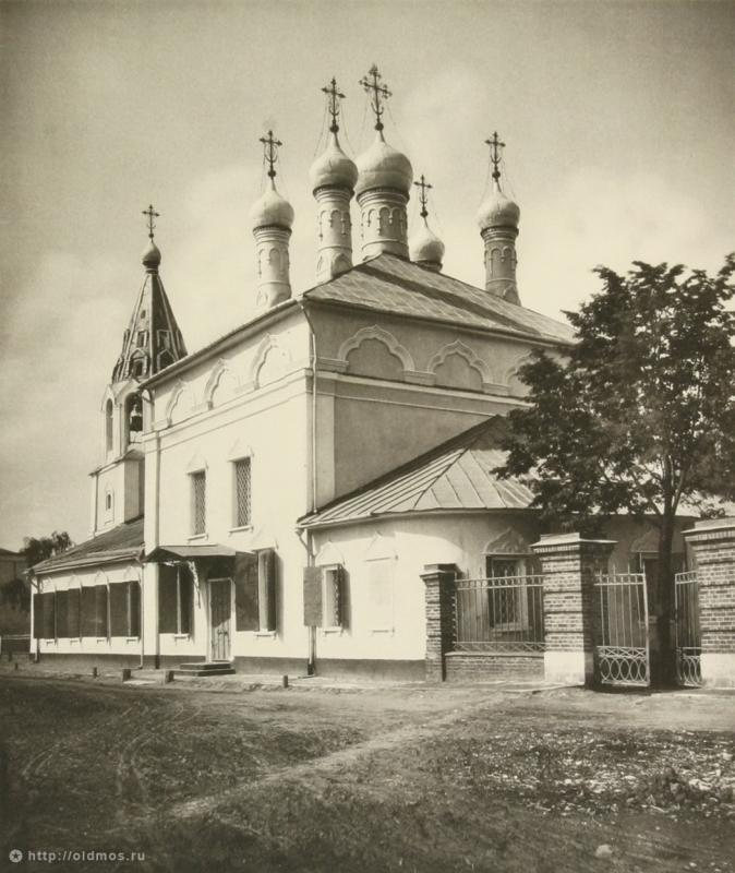 Церковь Рождества Христова в Кудрине (Поварская улица). Снесена в 1931 году